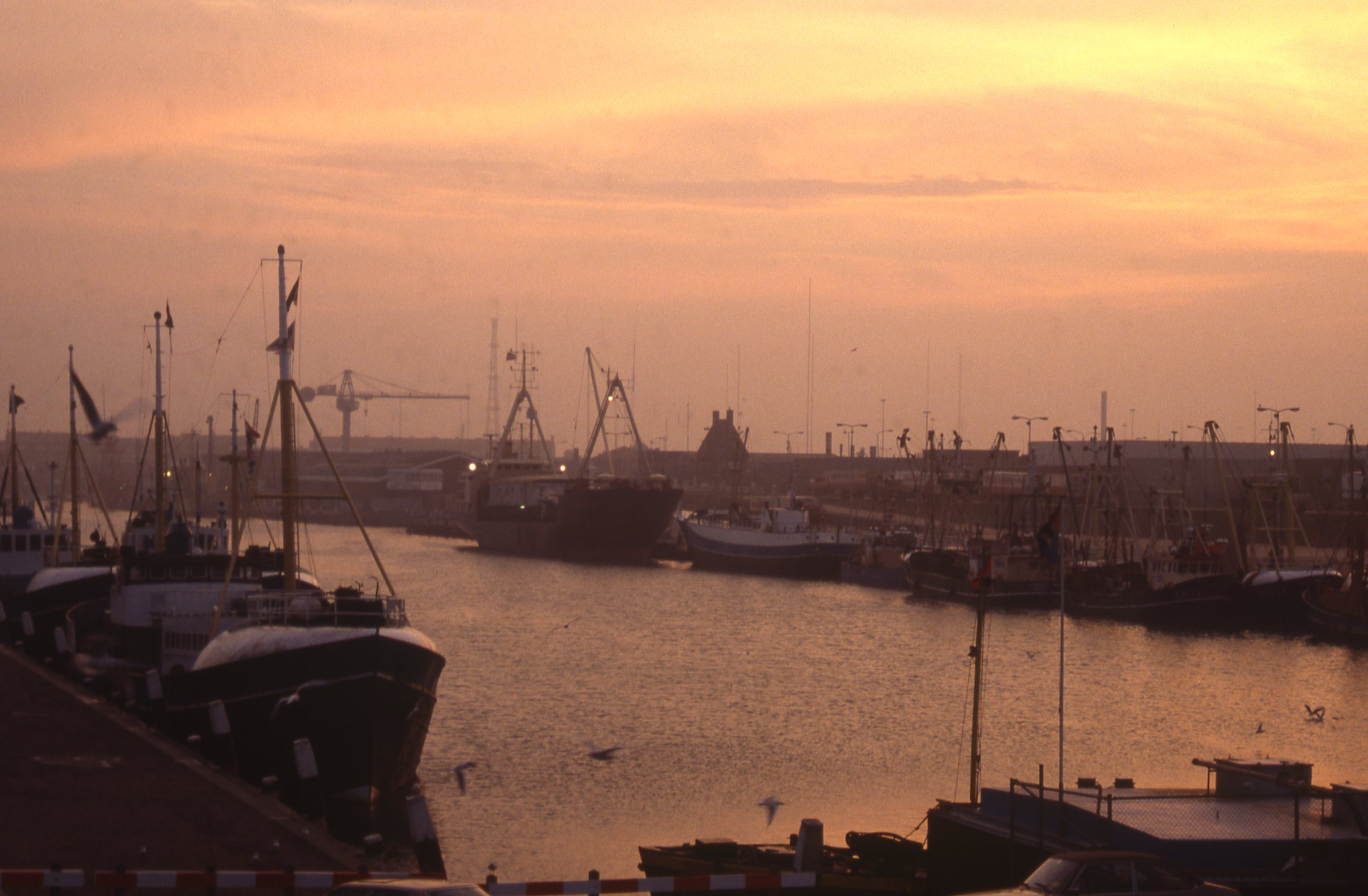 De Tweede Haven van Scheveningen toen deze nog als vissershaven werd gebruikt. Op de achtergrond zijn de antennes van radio Scheveningen nog zichtbaar.